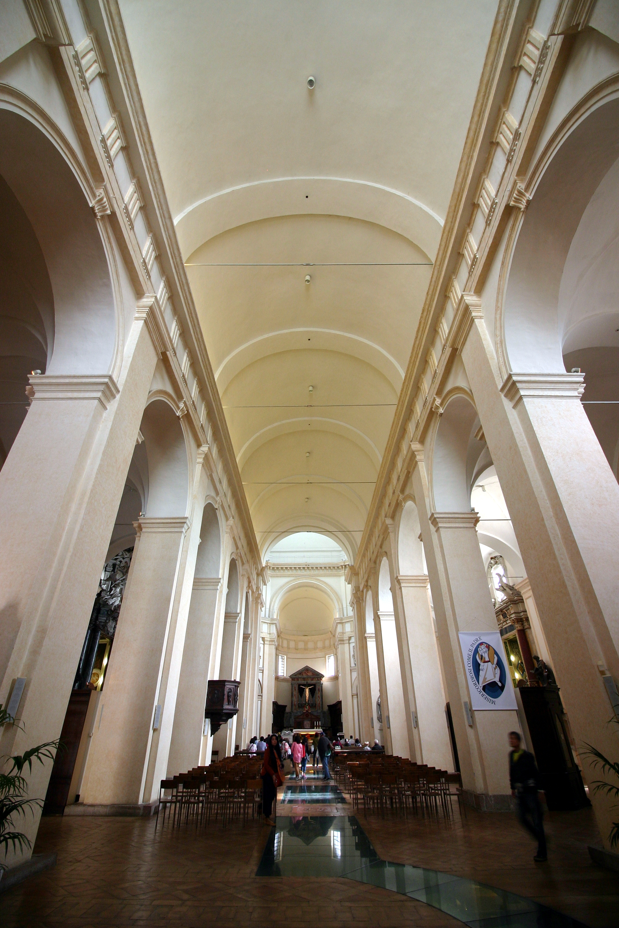 San Rufino - Assisi